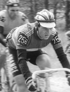 Friedensfahrt, Fahrerfeld ADN-ZB Kasper 20.5.87 Polen: 40. Internationale Friedensfahrt-11. Etappe von Karpacz nach Legnica über 160 km-Das Fahrerfeld nach dem Buffet beim Rennkilometer 120. Pascal Lance (Frankreich)